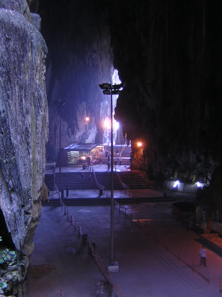 Batu Caves outside Kuala Lumpur, Malaysia